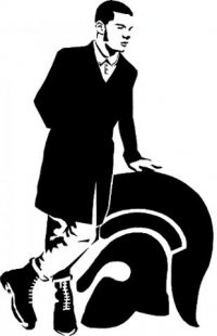 Suedeheads e Trad skins